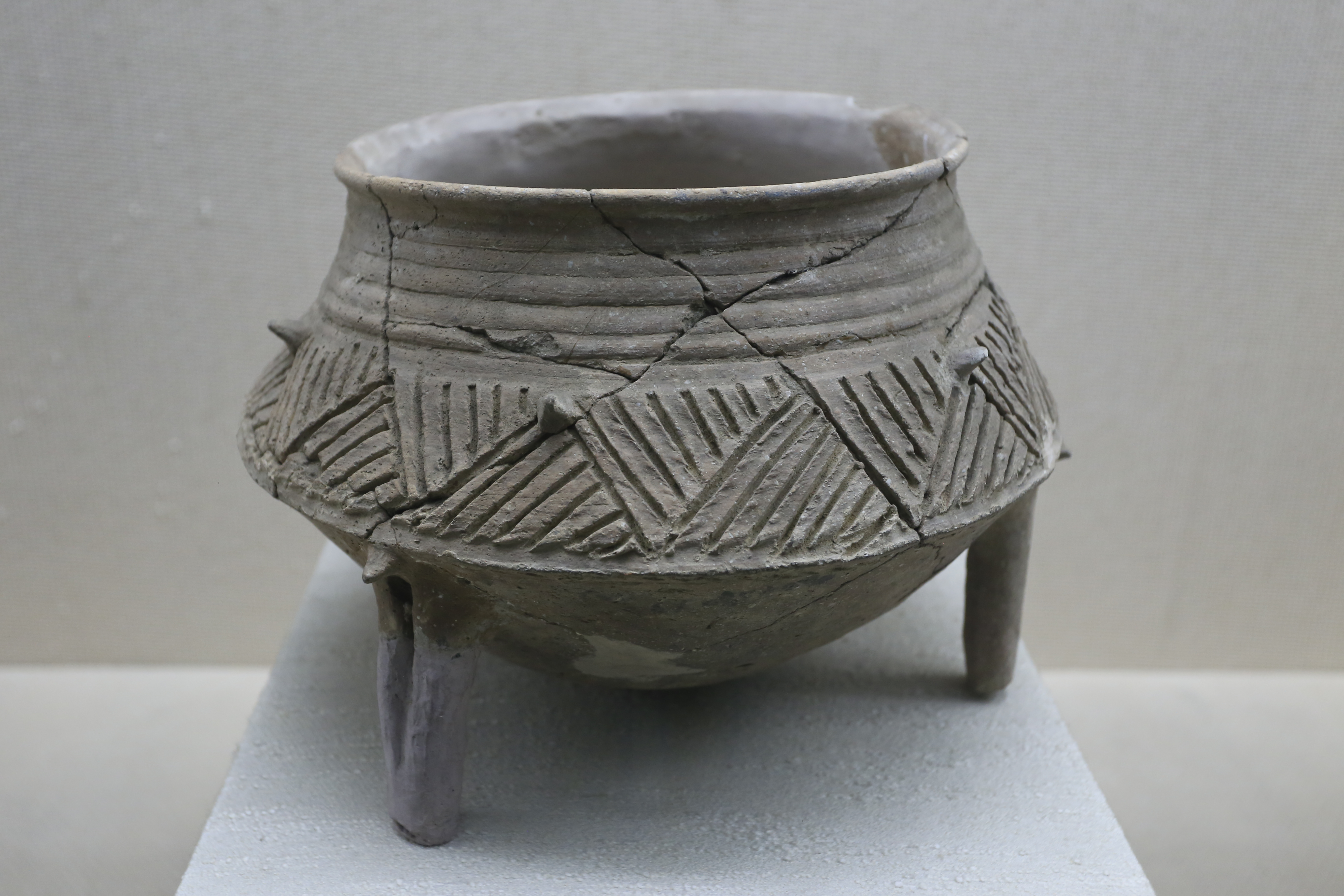 兖州博物馆—— 釜形鼎，大汶口文化，王因遗址出土